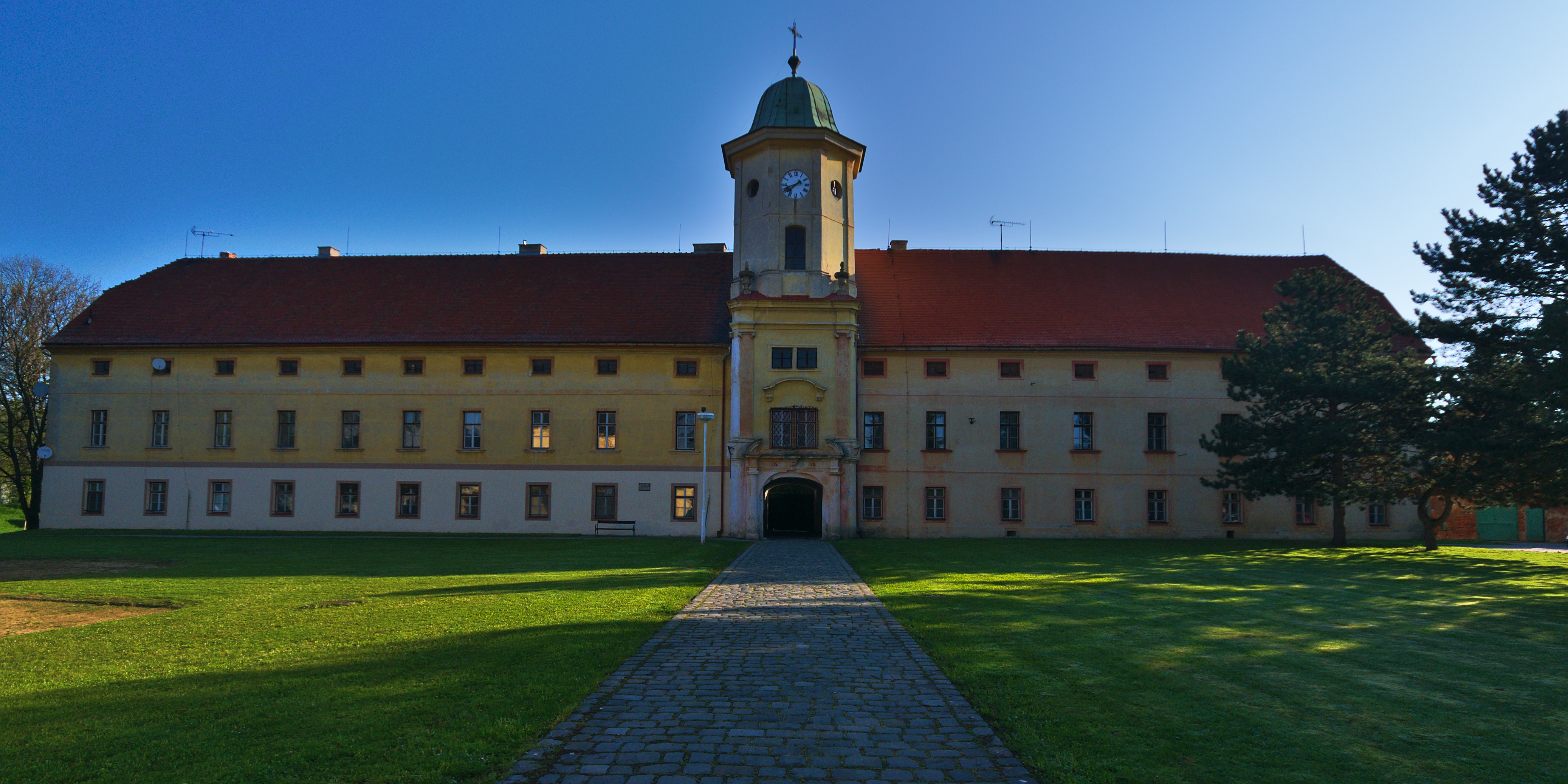 Zámek, Mořice, okres Prostějov